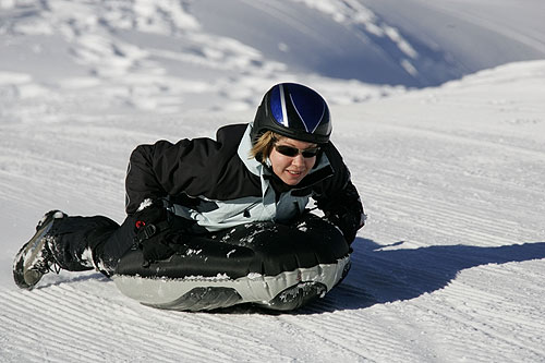 Airboard in Fahrt auf dem Schlittelweg Lenk